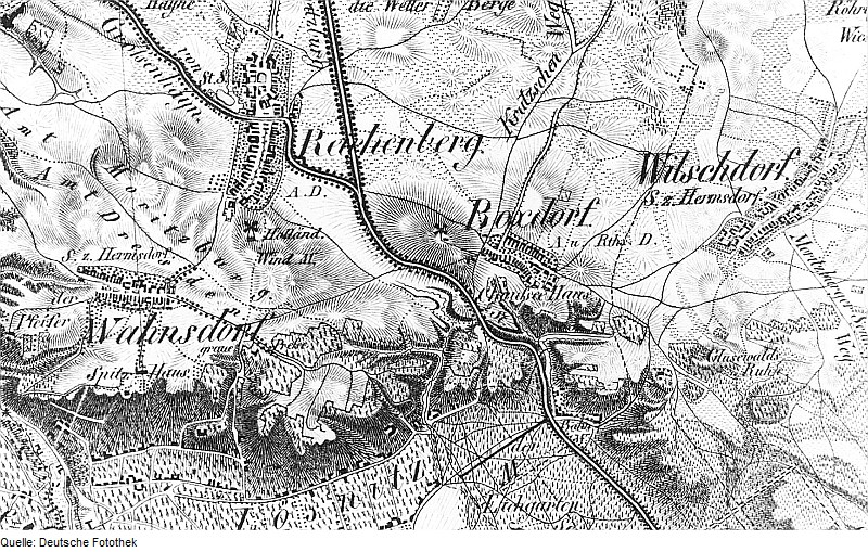 Original image description from the Deutsche Fotothek Moritzburg-Boxdorf. Ausschnitt aus: Oberreit, Sect. Dresden, 1821/22